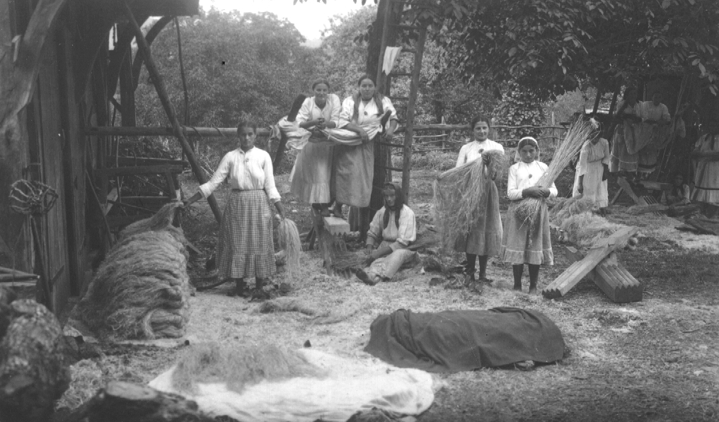 Teritev tukačic v Preloki pri Adlešičih